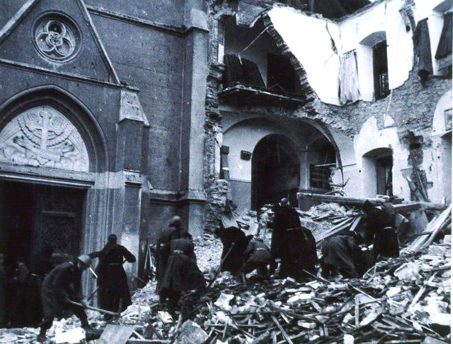 Ruševine nakon bombardiranja Zagreba 1944.